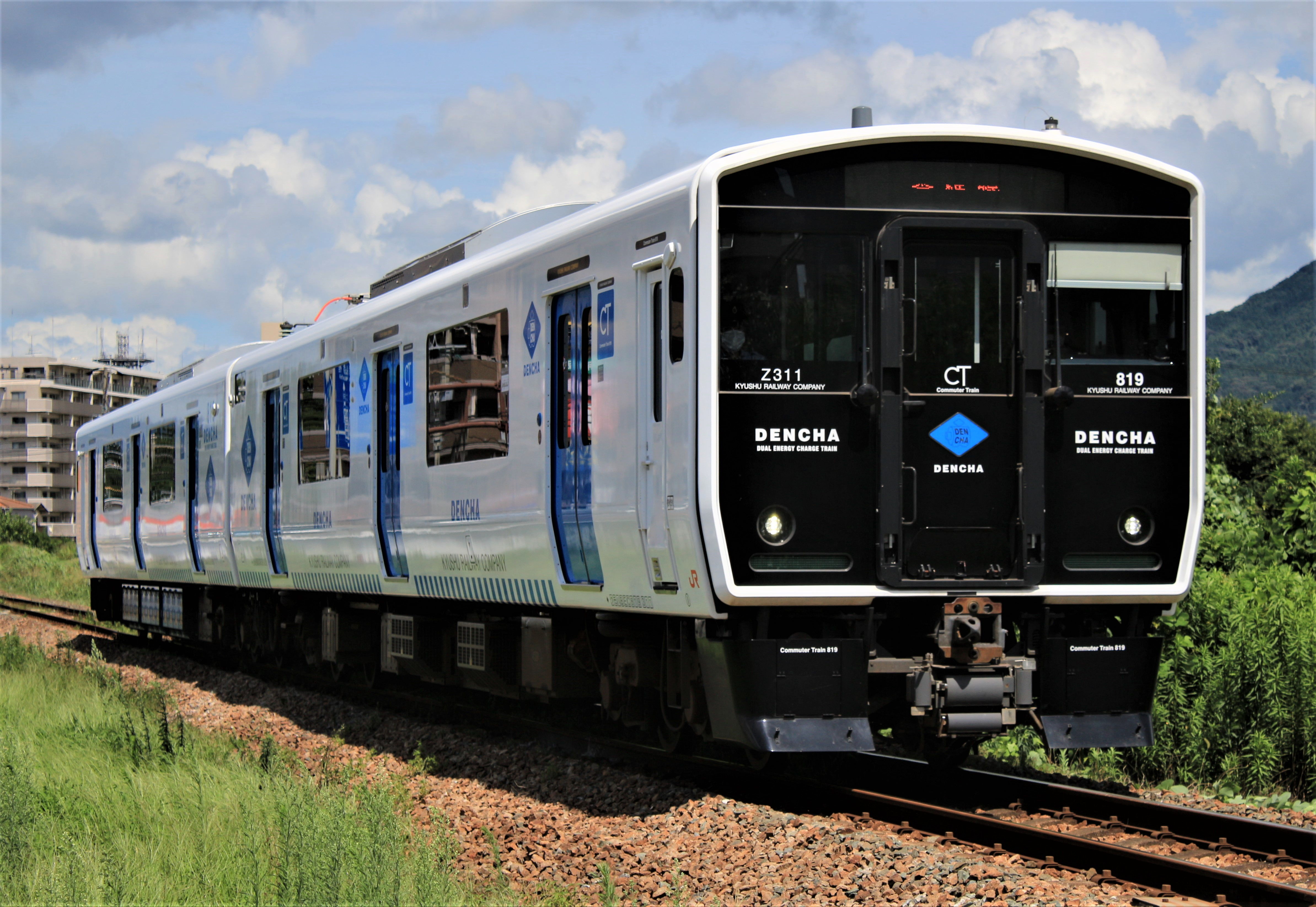 JR九州BEC819系電車 Canon EOS Kiss X7i